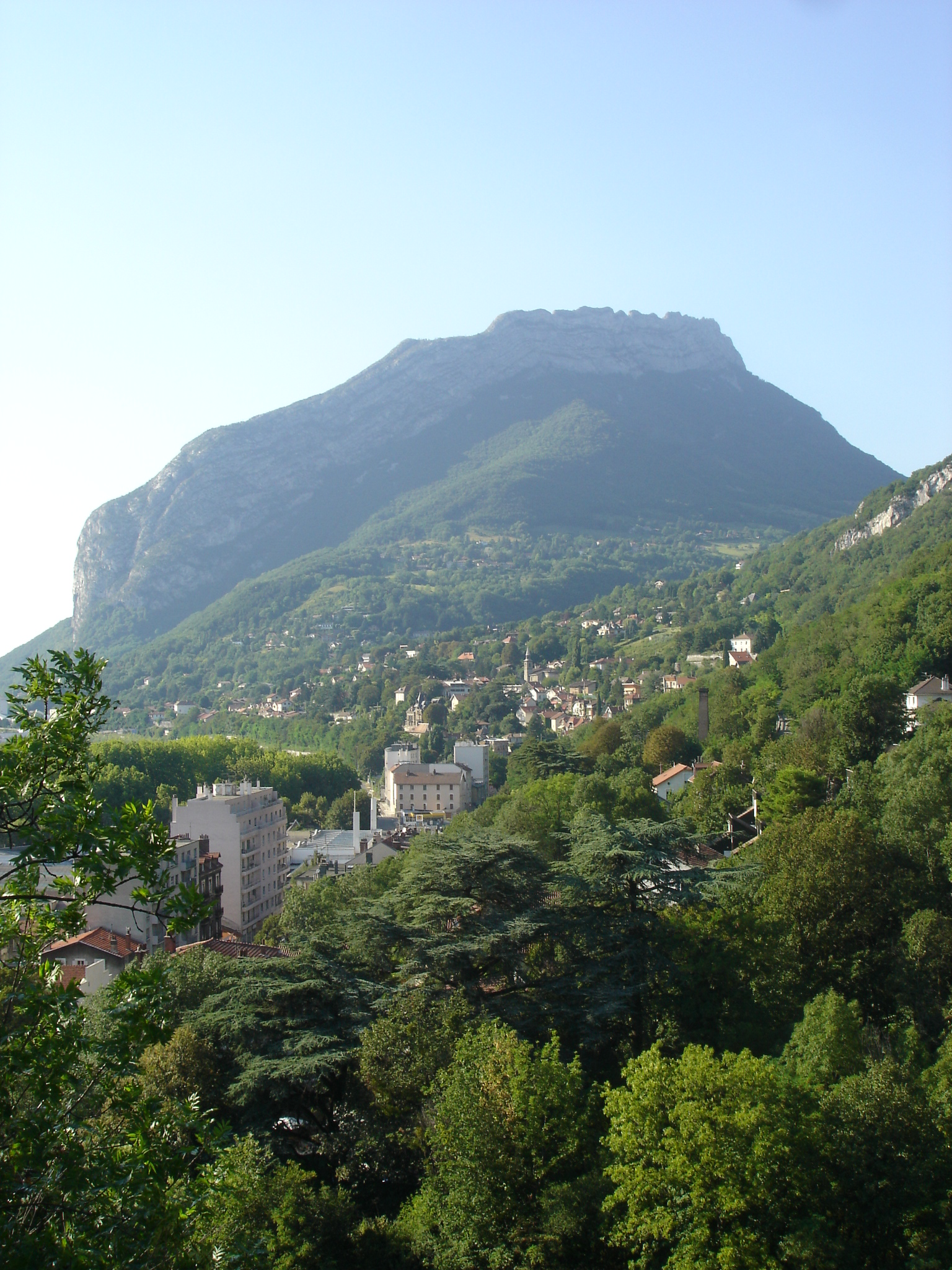 Saint-Martin-le-Vinoux au pied de la montagne du Néron. Vue depuis le Jardin des Dauphins à Grenoble